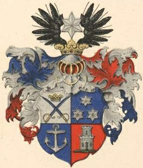 Antropoffi suguvõsa aadlivapp